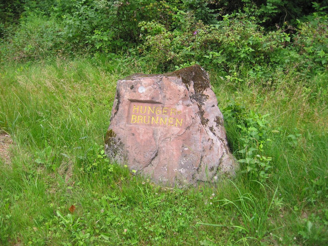 Ritterstein Nummer 153, Hungerbrunnen